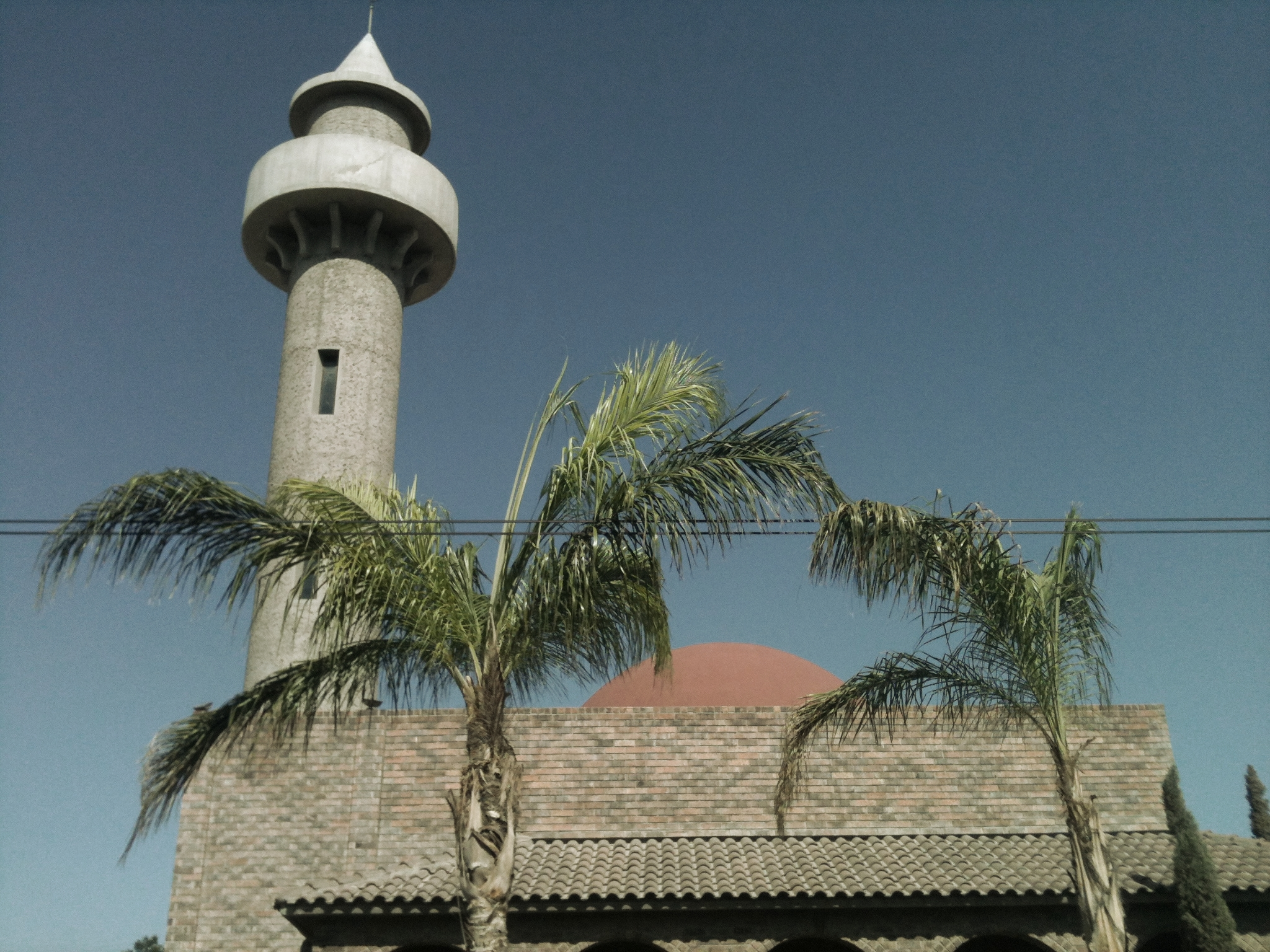 Mezquita Soraya. Primer mezquita de México.